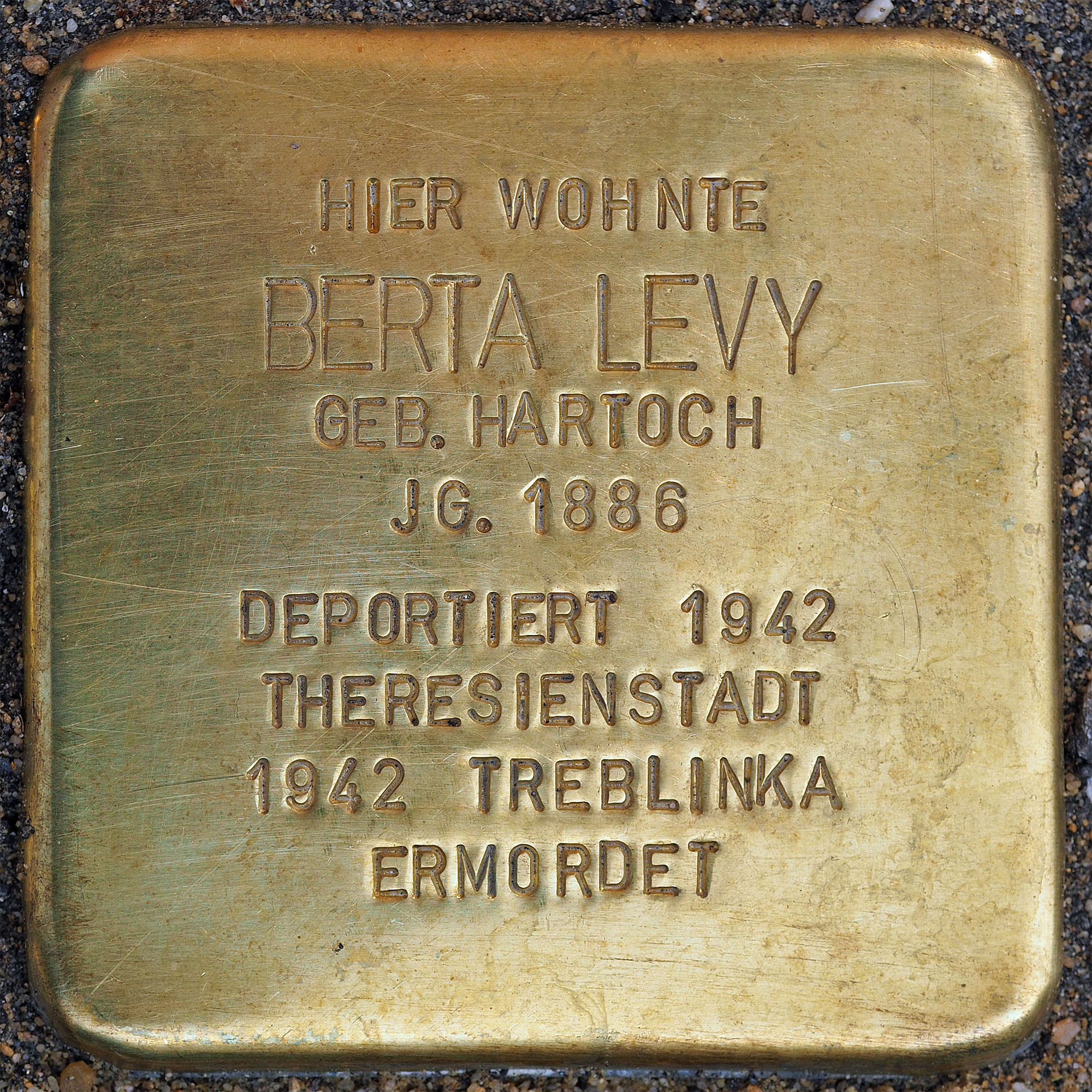 Stolpersteine Schwalmtal: Berta Levy